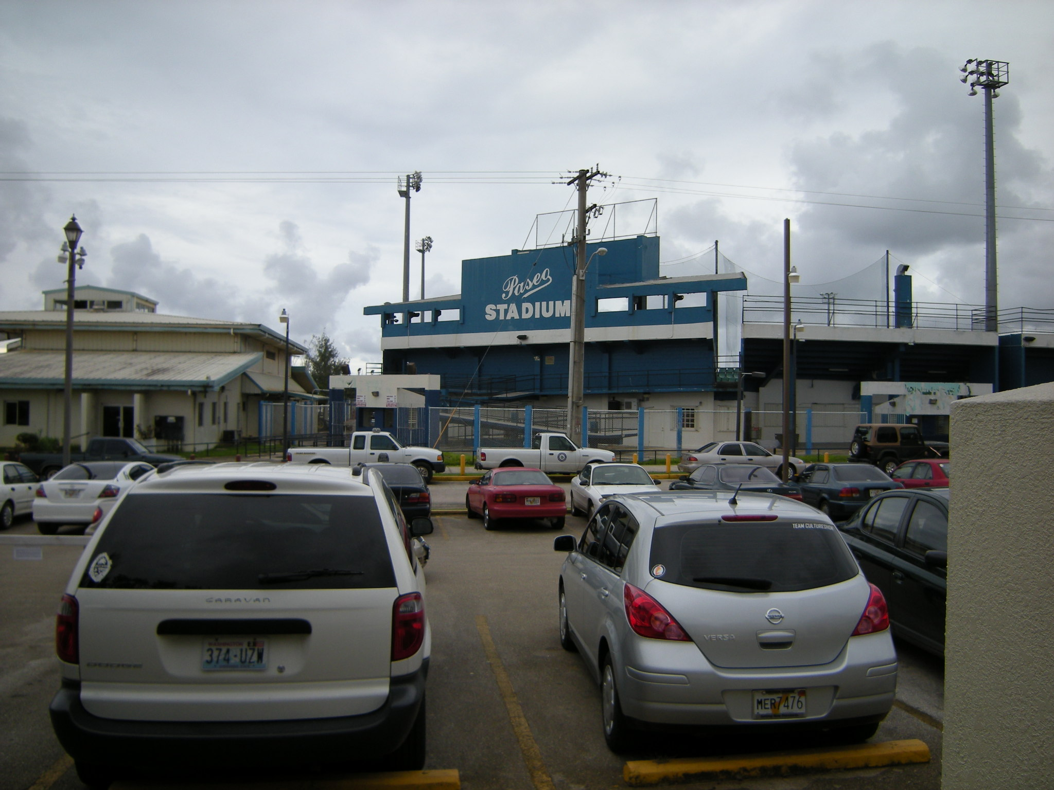 Paseo Baseball Stadium